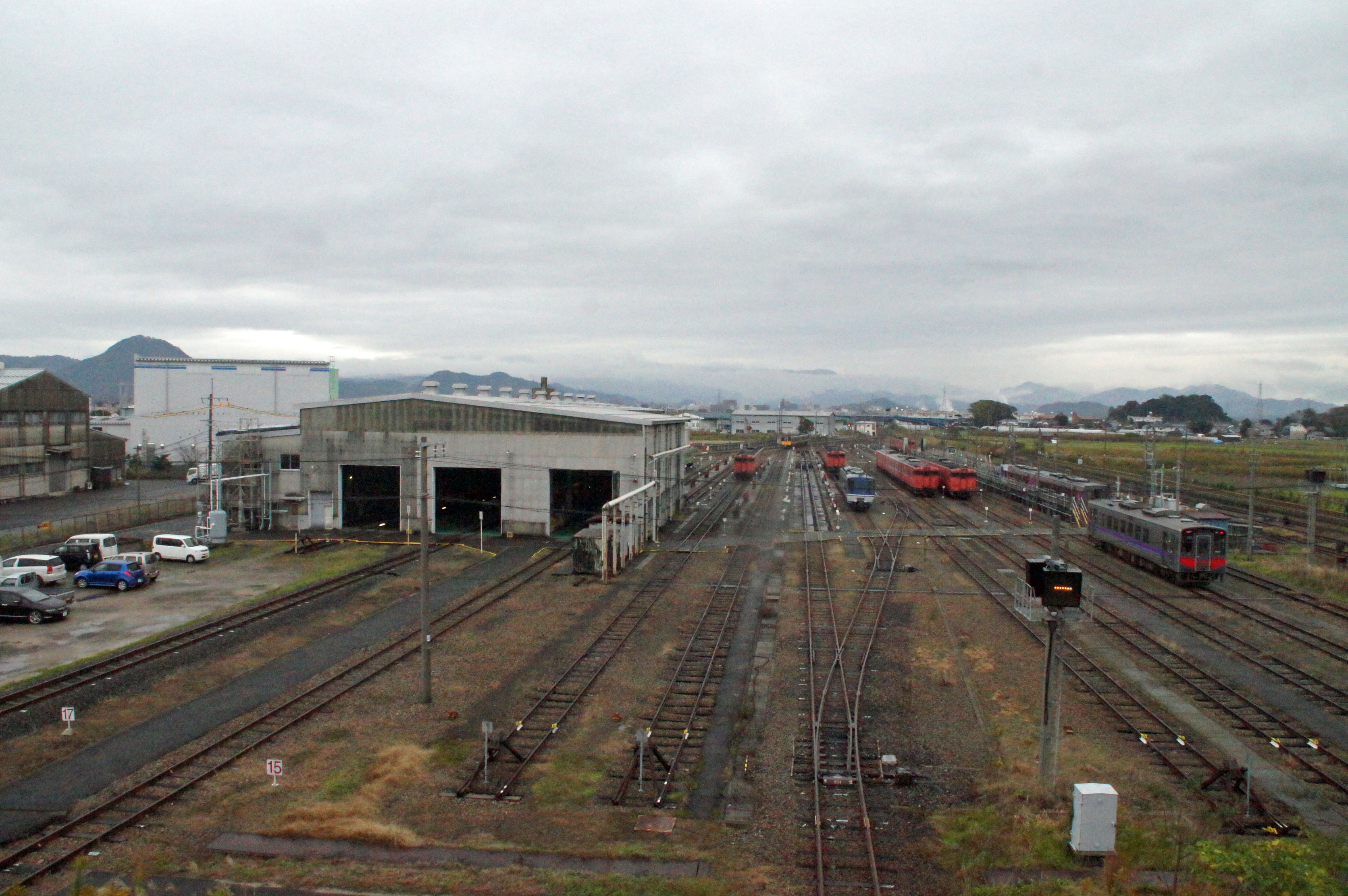 鳥取鉄道部西鳥取車両支部